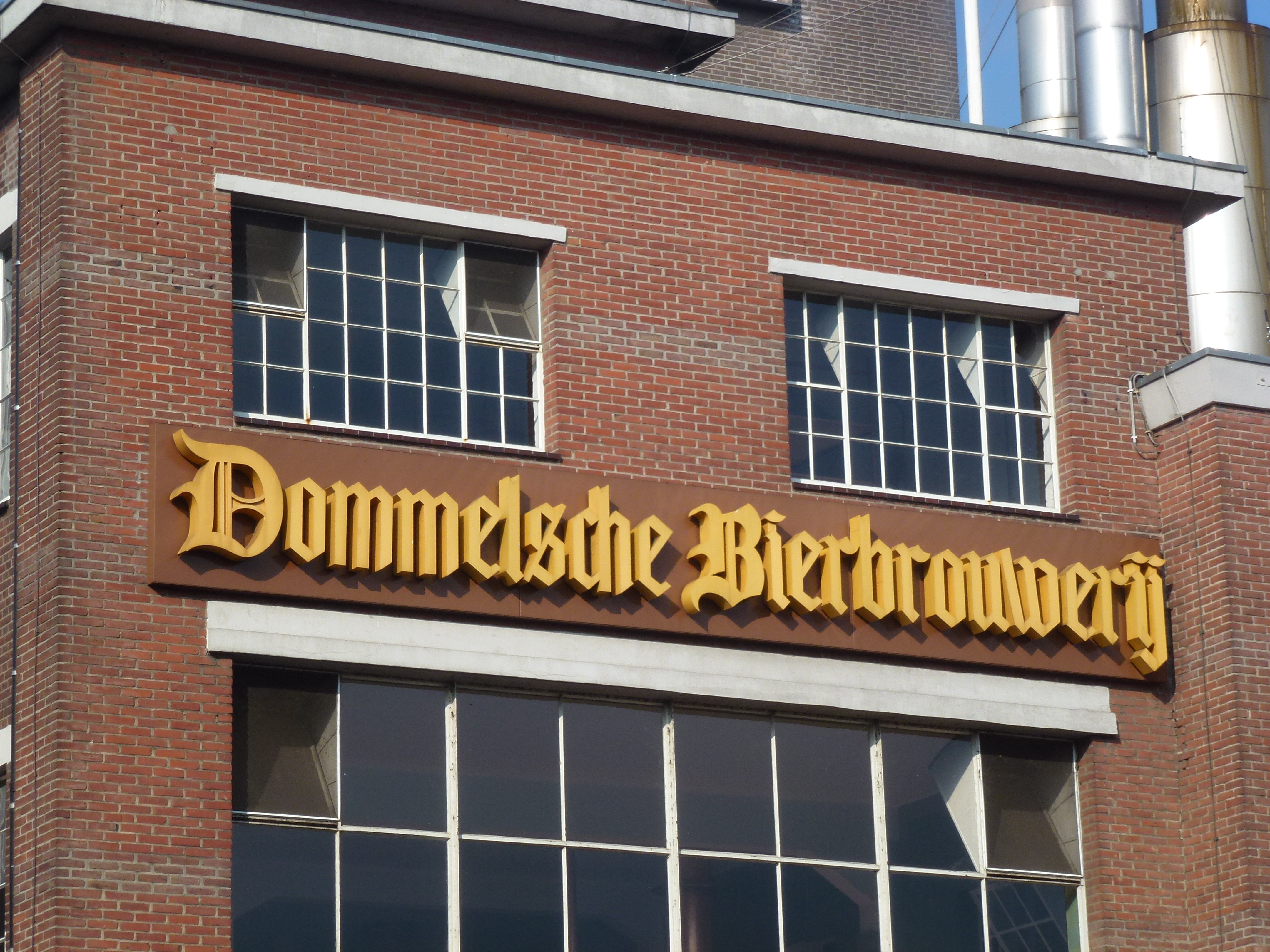 Dommelsche Bierbrouwerij